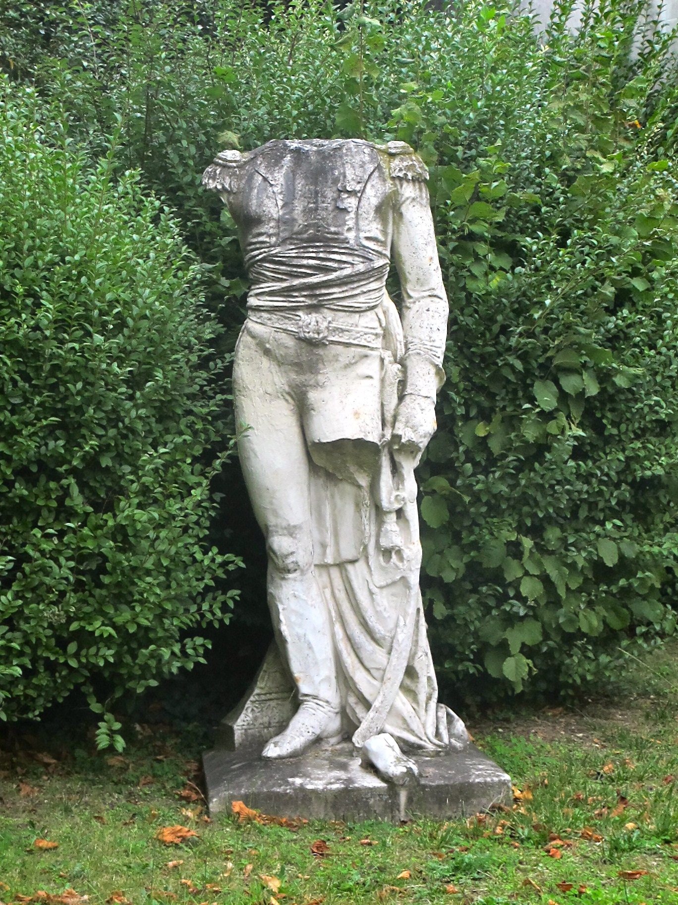 Statue à tête coupée située au lycée militaire de Saint-Cyr.